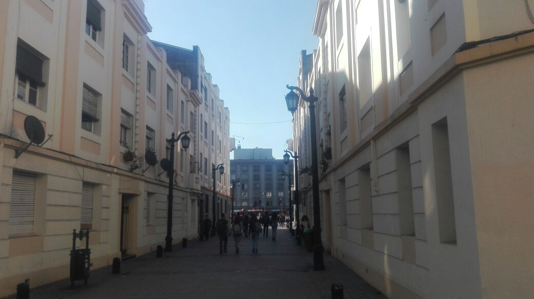 Fotografía lunes por la tarde en pasaje General Garcia; Barrio Universitario.